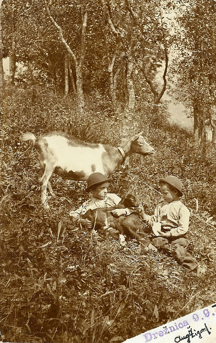 Razglednica Drežniške koze.